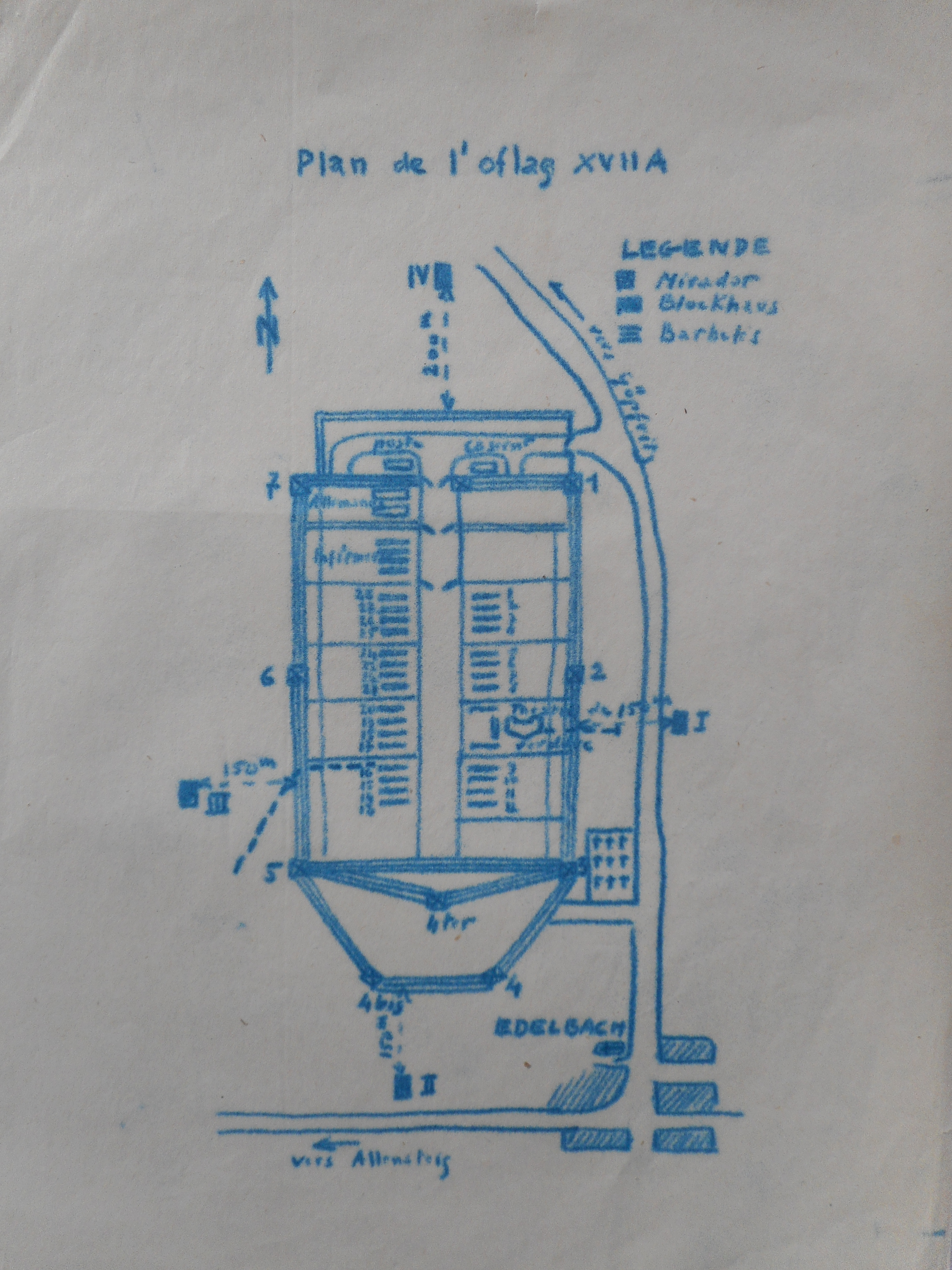 Plan de l'Oflag XVII A avec le tracé du tunnel réalisé (Du théâtre de verdure) et du tunnel envisagé (Entre baraquements 16 et 17)